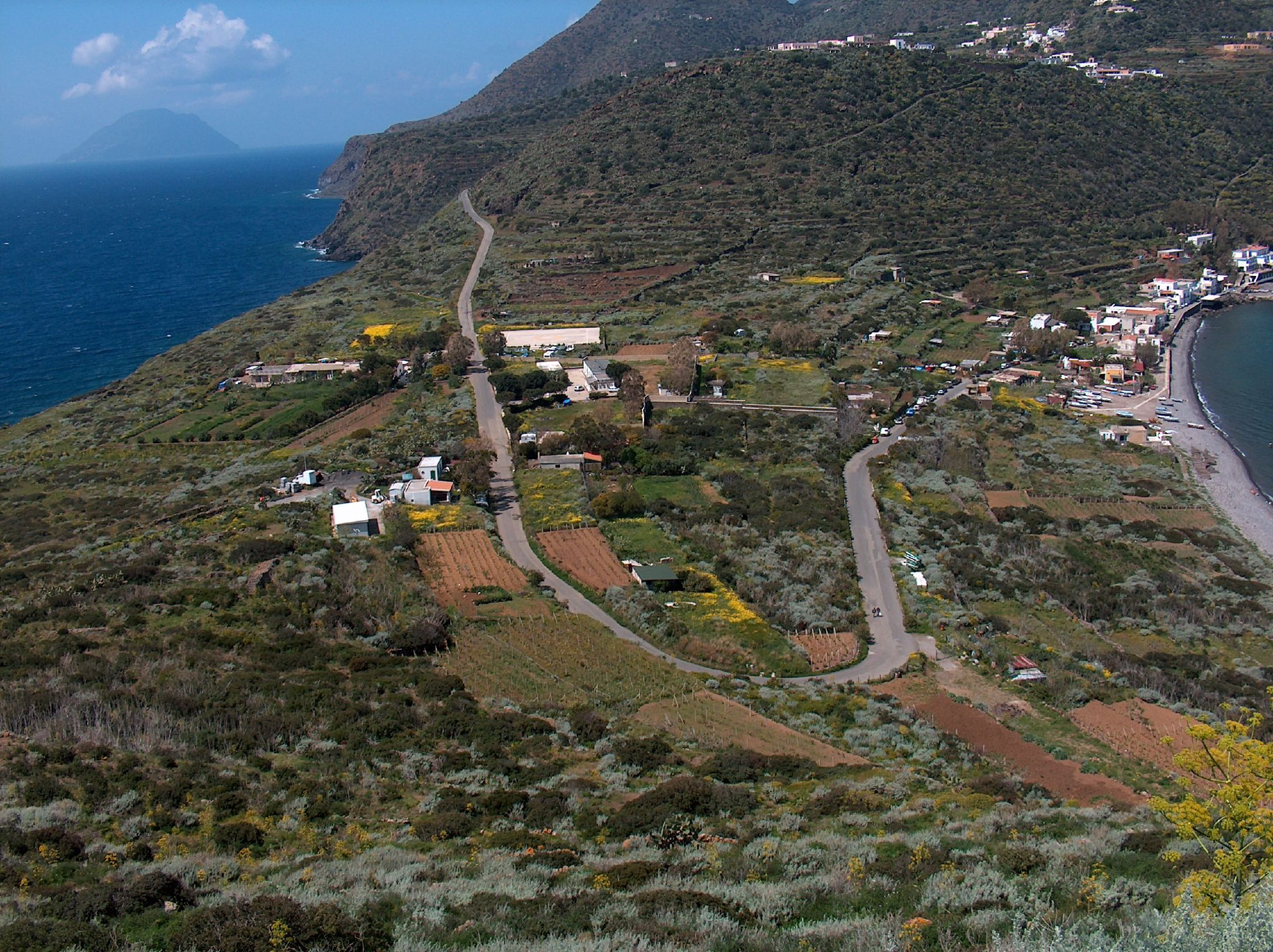 Filicudi, Sicilia, Italia